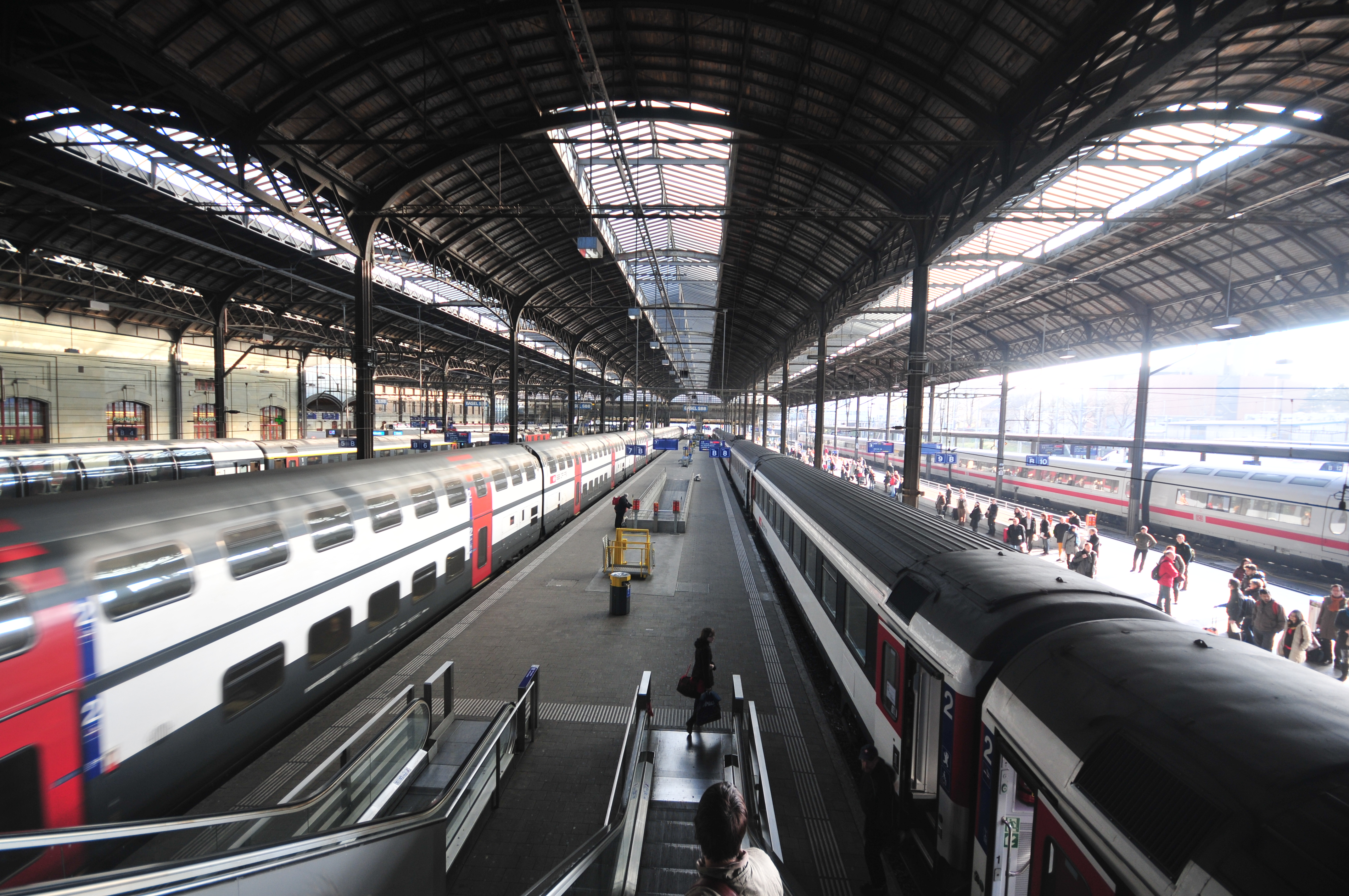 Basel